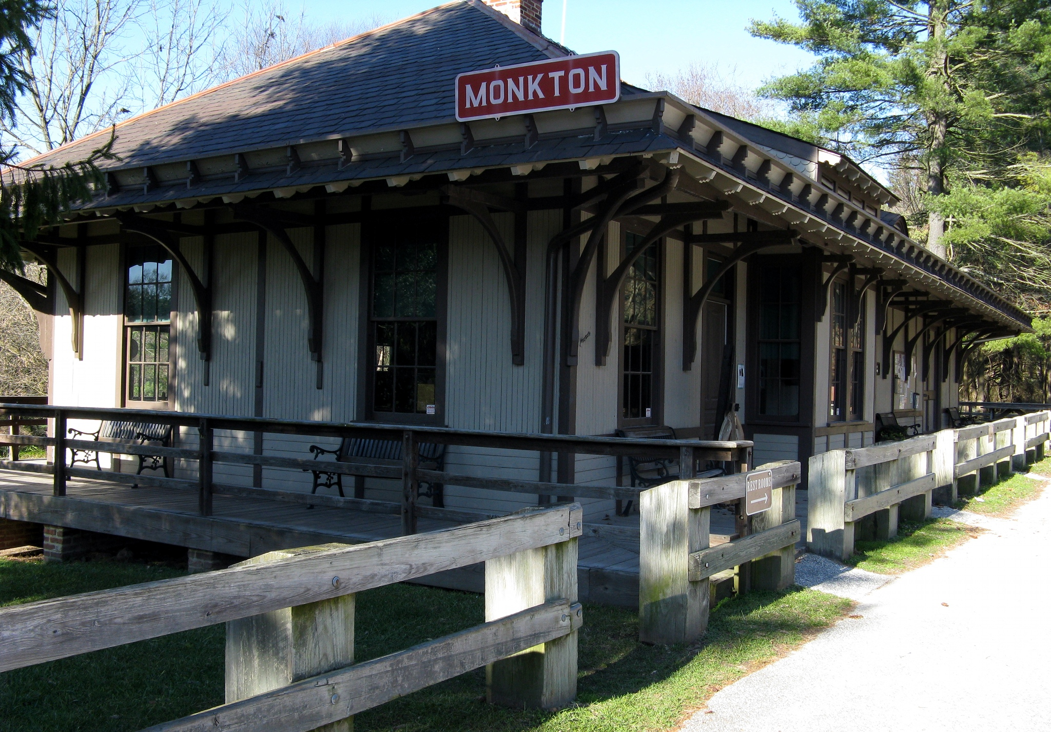 Monkton Place